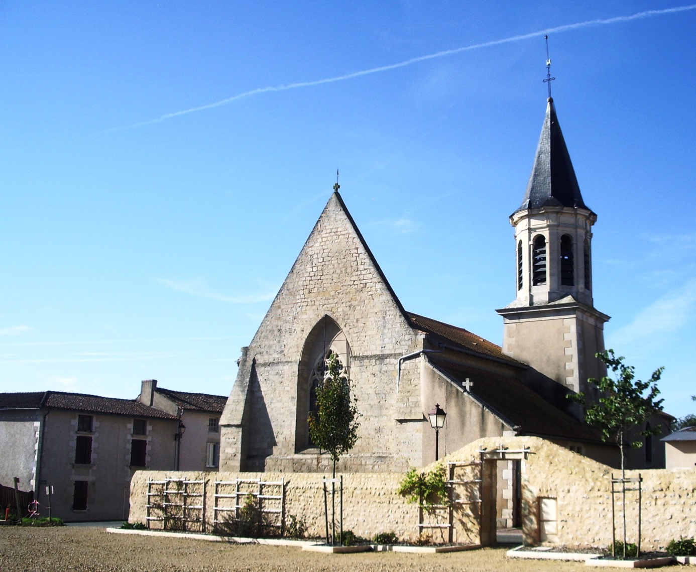 Église Saint Gervais & Saint Protais d'Ayron (86).